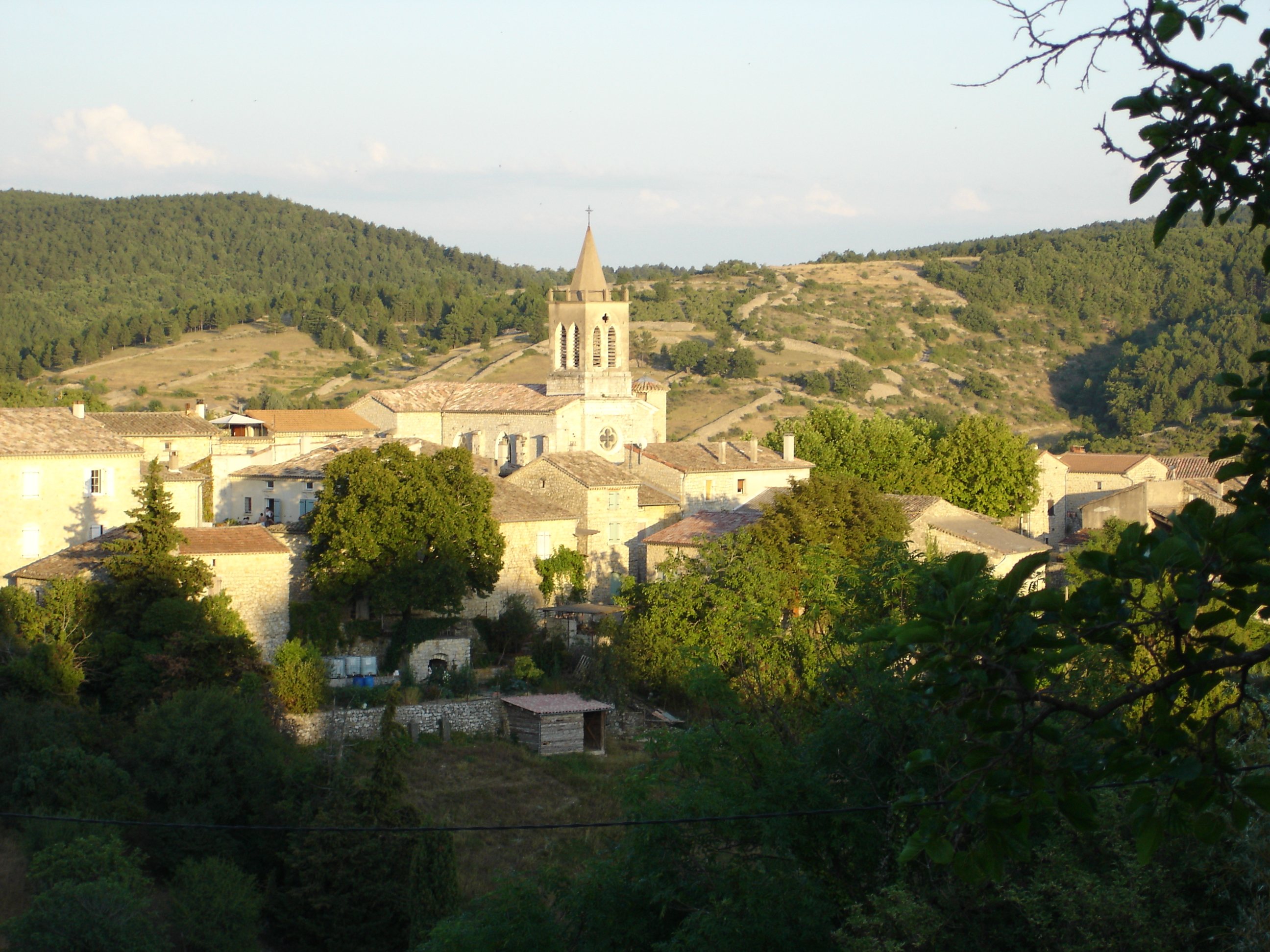 vue générale de saint-andéol-de-berg ardèche